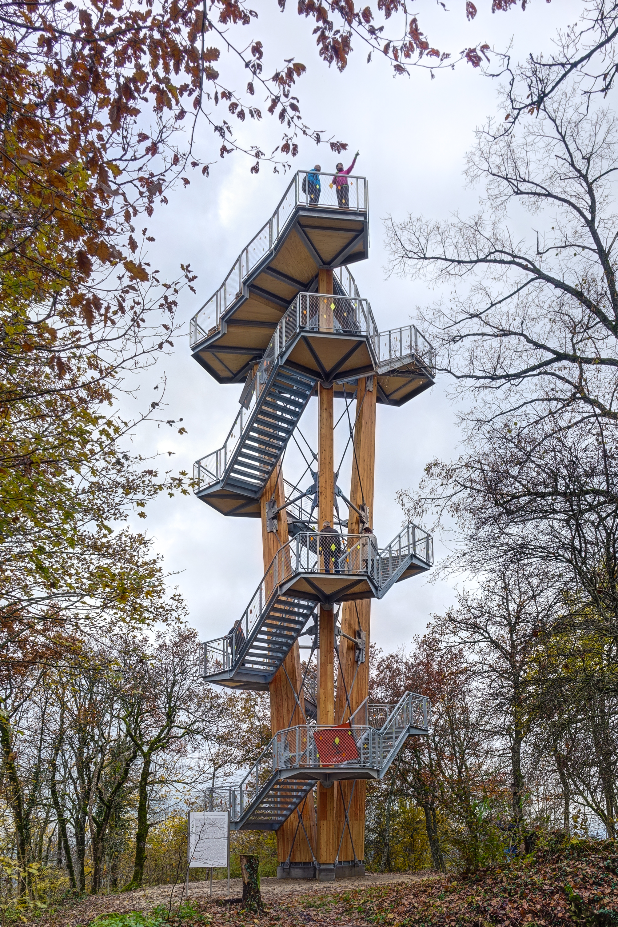 Der neue Siblinger Randenturm "Chläggiblick". Blick von Osten.